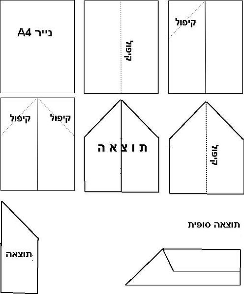 הוראות ליצירת מטוס נייר. (Paper_plane_diagram.png) עם עיבוד קל ב"צייר" של חלונות להחלפת הטקסט לעברית. hebrew version of Image:Paper plane diagram.png